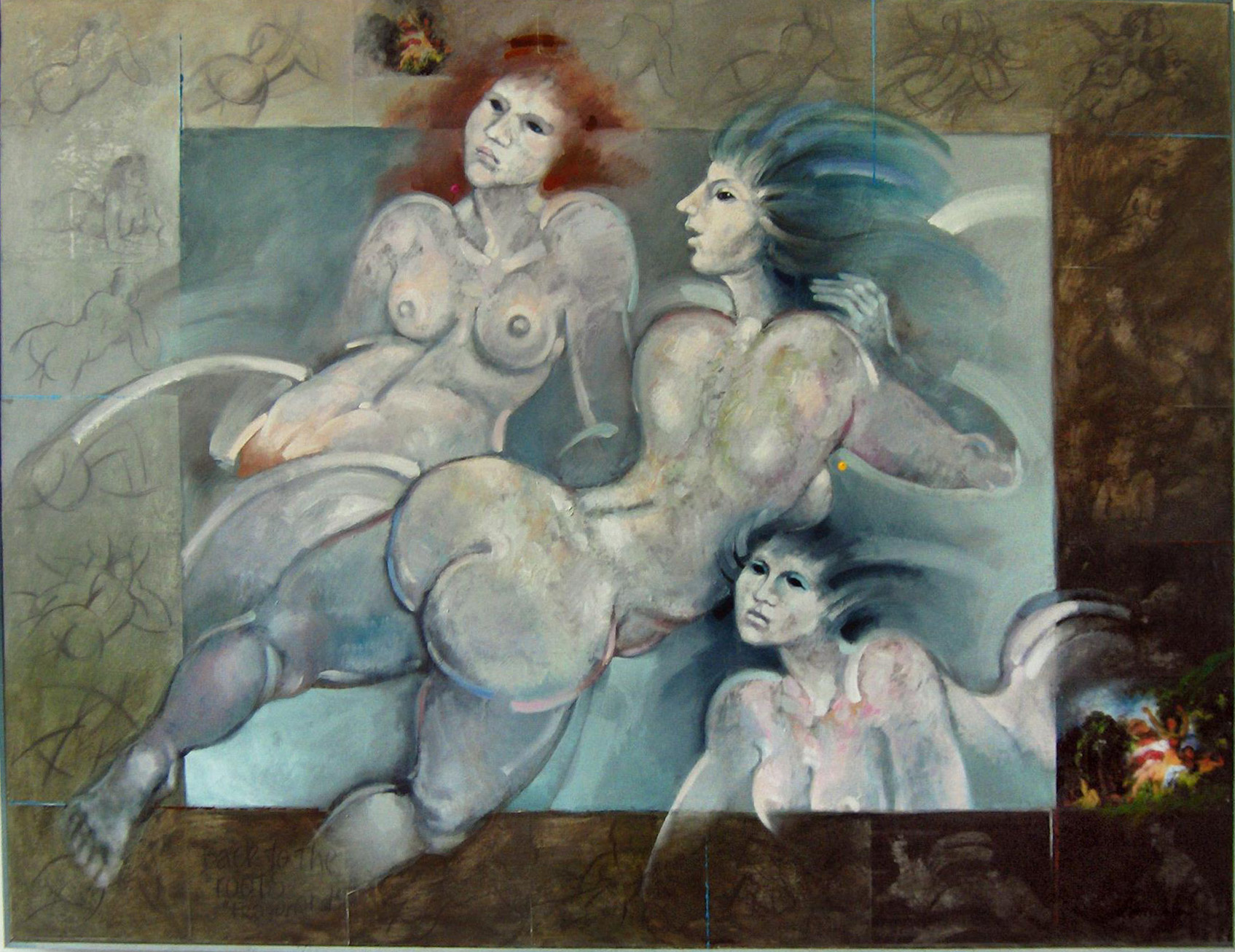 Three women - Back to the roots "Fragonard" 1991 Acryl op doek 150 x 200